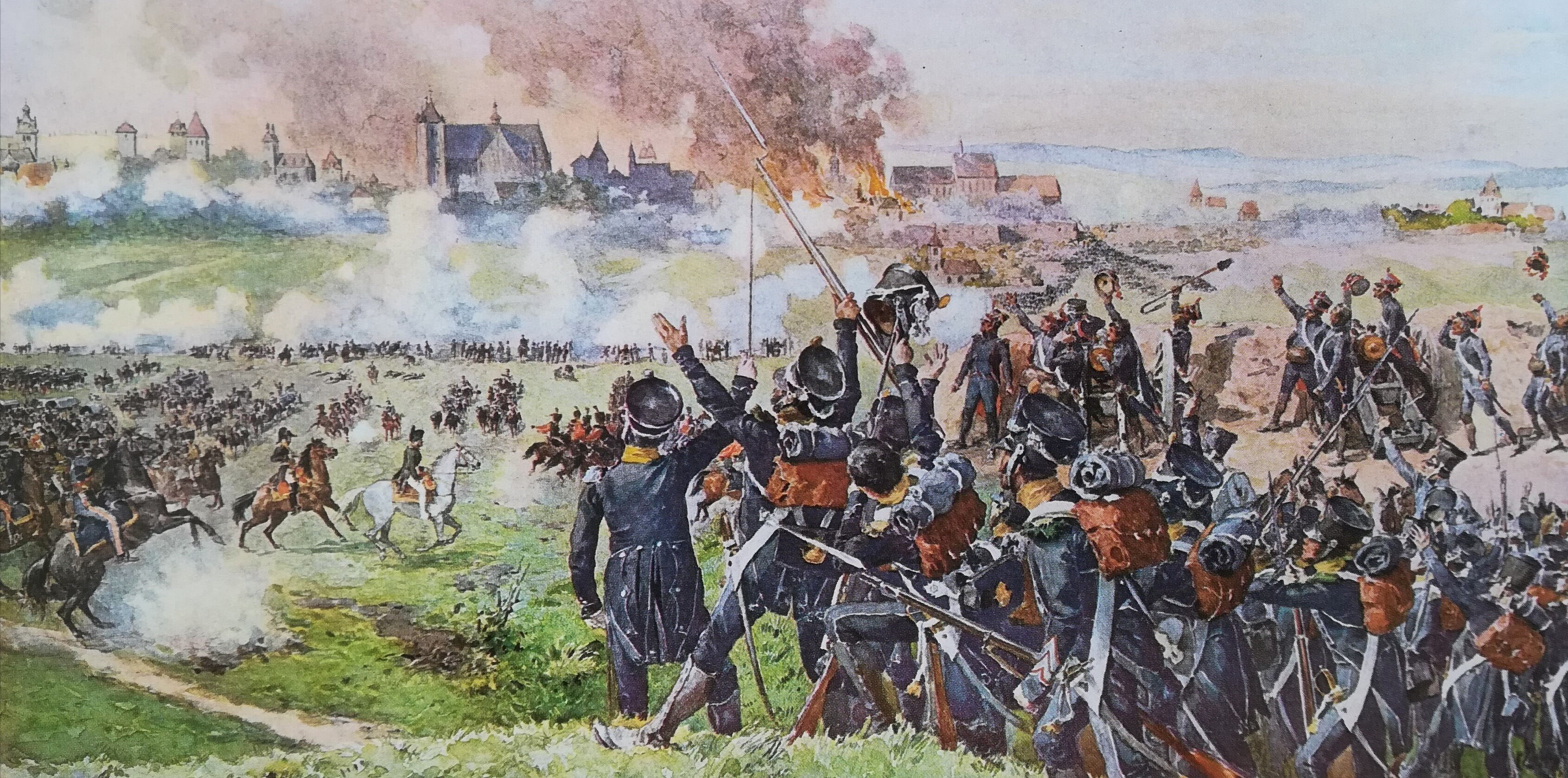 Napoléon défilant sur le front des troupes à Ratisbonne, le 23 avril 1809. Blessé au pied par une balle tirée depuis la forteresse, l'Empereur parcourt les lignes de siège à cheval et est acclamé par ses soldats, qui s'inquiétaient de la dangerosité de sa blessure. Typogravure d'après une aquarelle de Felician Myrbach, extraite de l'ouvrage de William M. Sloane, Life of Napoleon Bonaparte, volume III, New York, The Century Co., 1896.